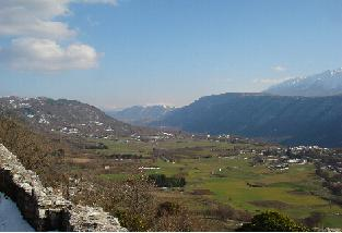 Panoramica della Valle Subequana vista dal borgo medievale di Castello